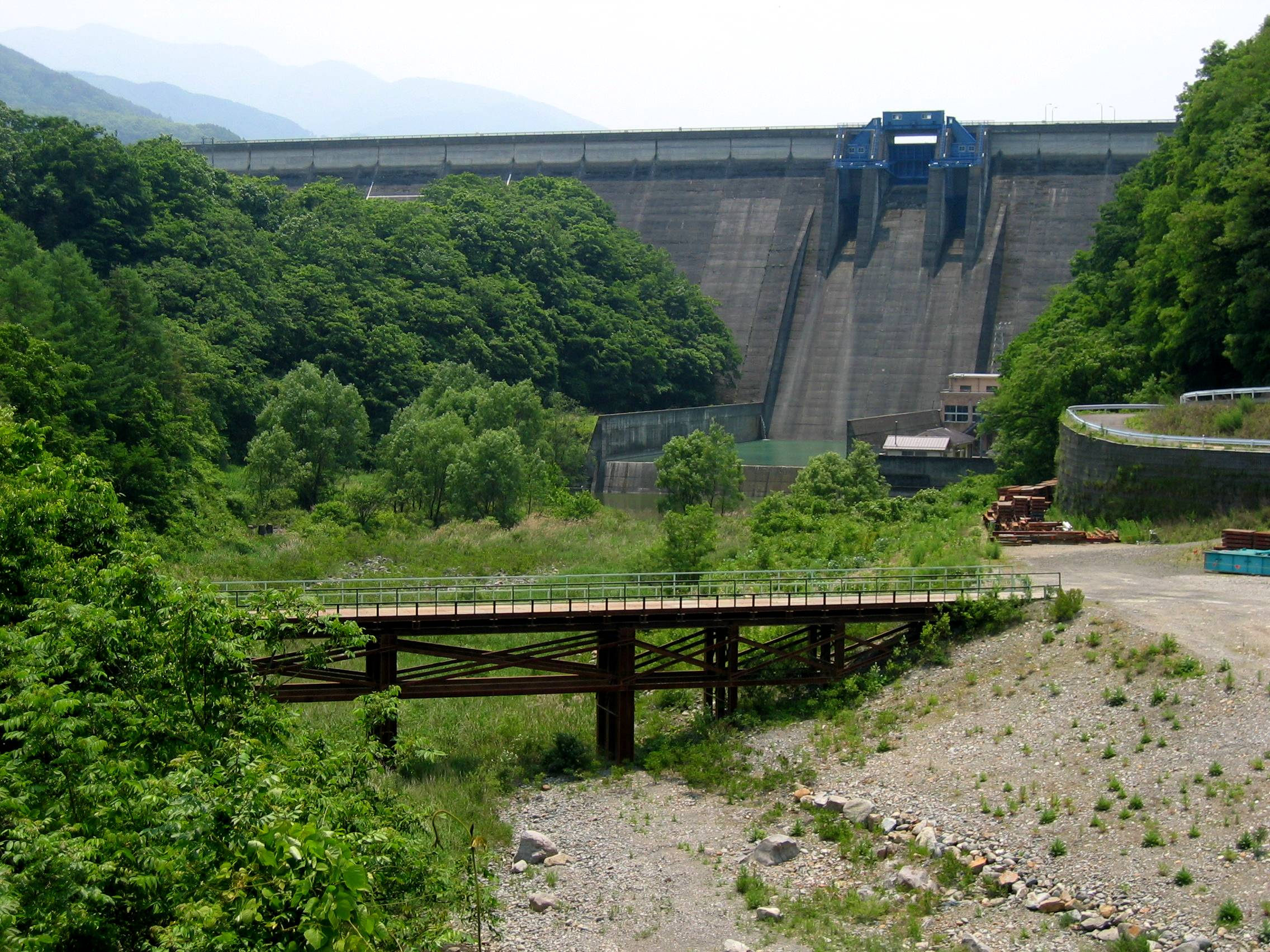 Miwa dam (美和ダム) is a dam in Japan.